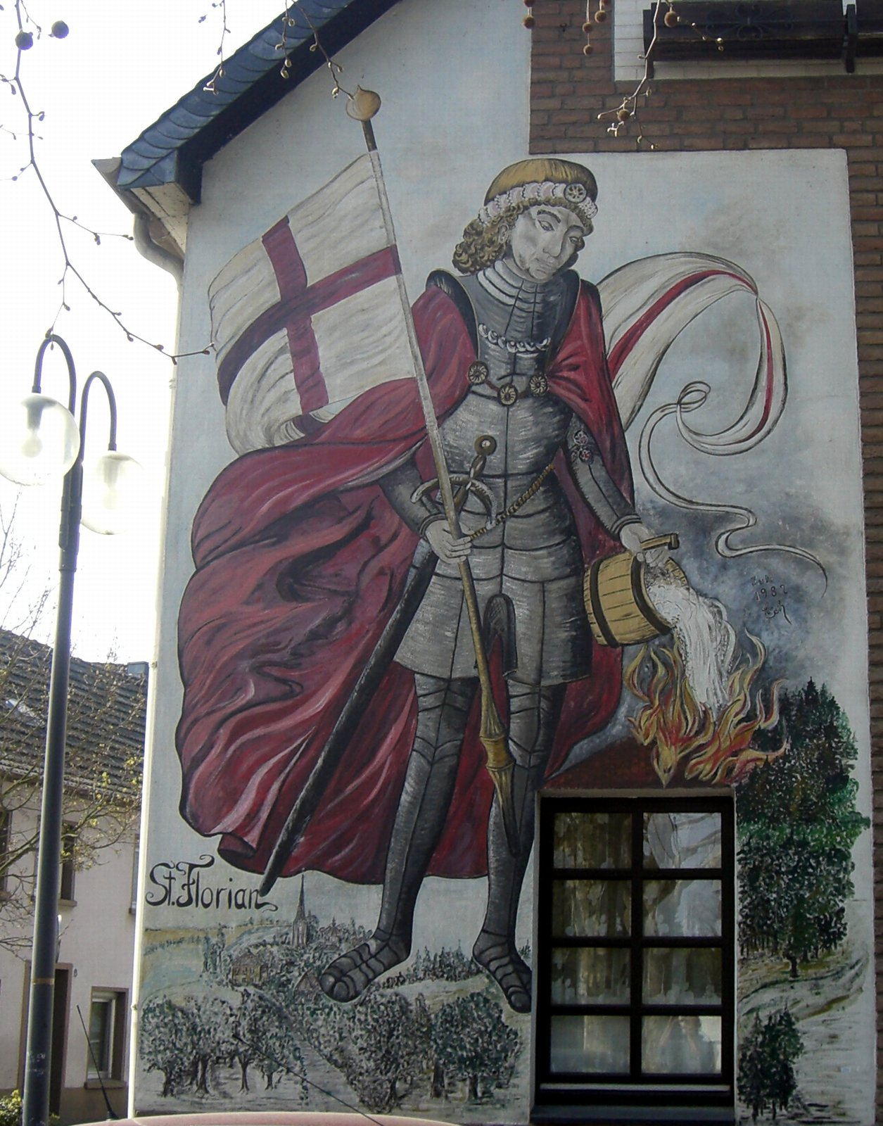 Malerei an einer Hauswand in der Nähe der Feuerwehr in Süchteln.